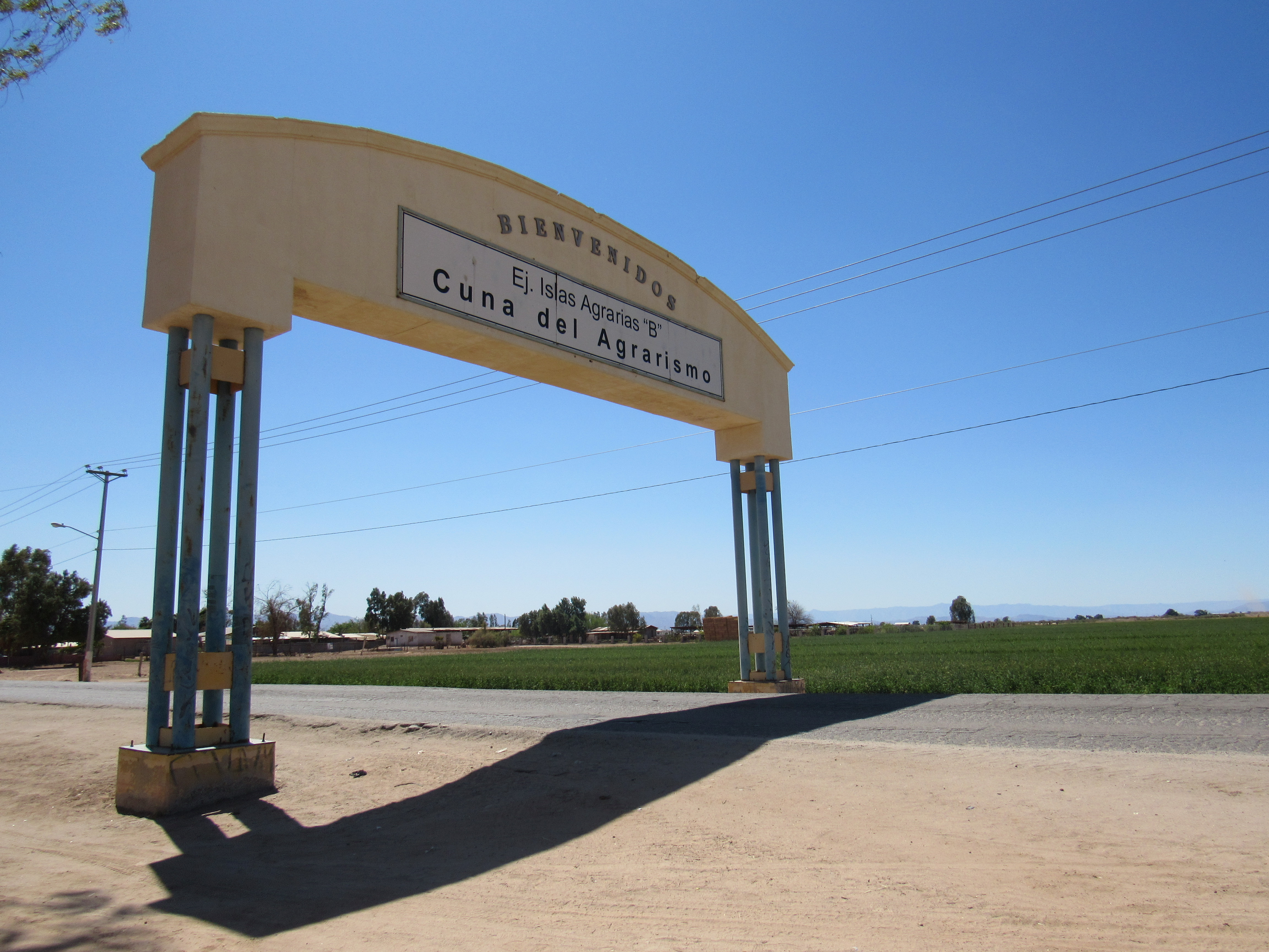 Este es otro aspecto del pórtico de entrada al poblado del ejido Islas Agrarias Grupo B, en el cual puede leerse: Bienvenidos / Ej. Islas Agrarias "B" / Cuna del Agrarismo. El letrero hace referencia a su historia local como una parte importante del movimiento agrarista del valle de Mexicali, denominado: Asalto a las Tierras.